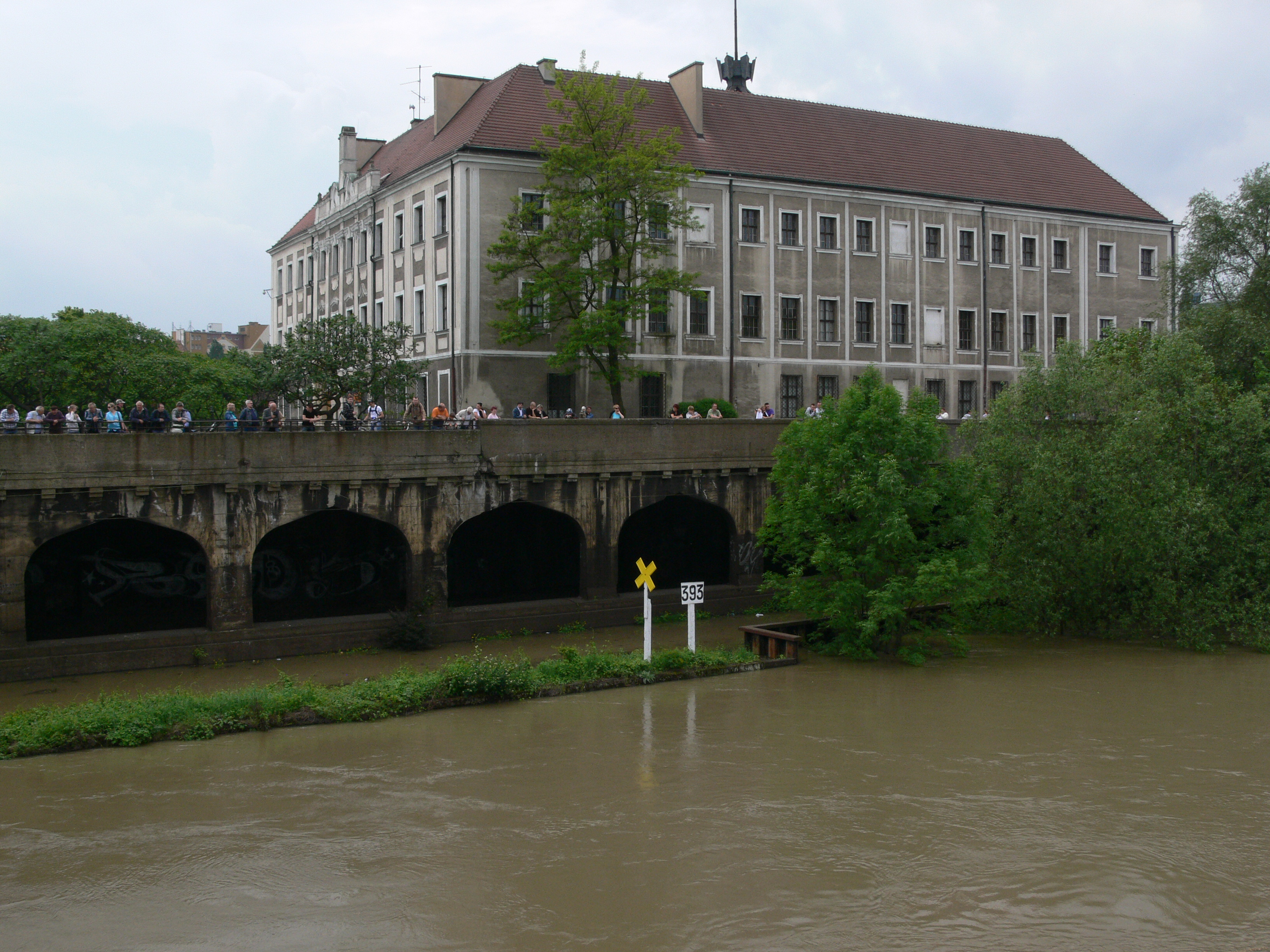 Głogów, ul. Brama Brzostowska 1 - zamek książęcy (wzniesiony przez księcia głogowskiego Konrada I), XIII, XX (podczas powodzi 2010 r.)